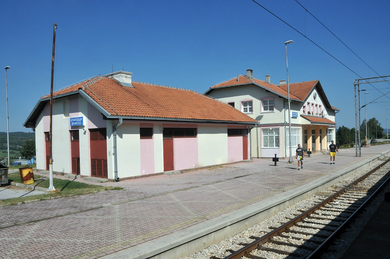 Branesci rail station, Serbia